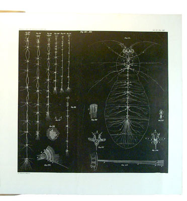 Plate from Monografia del bombice del gelso